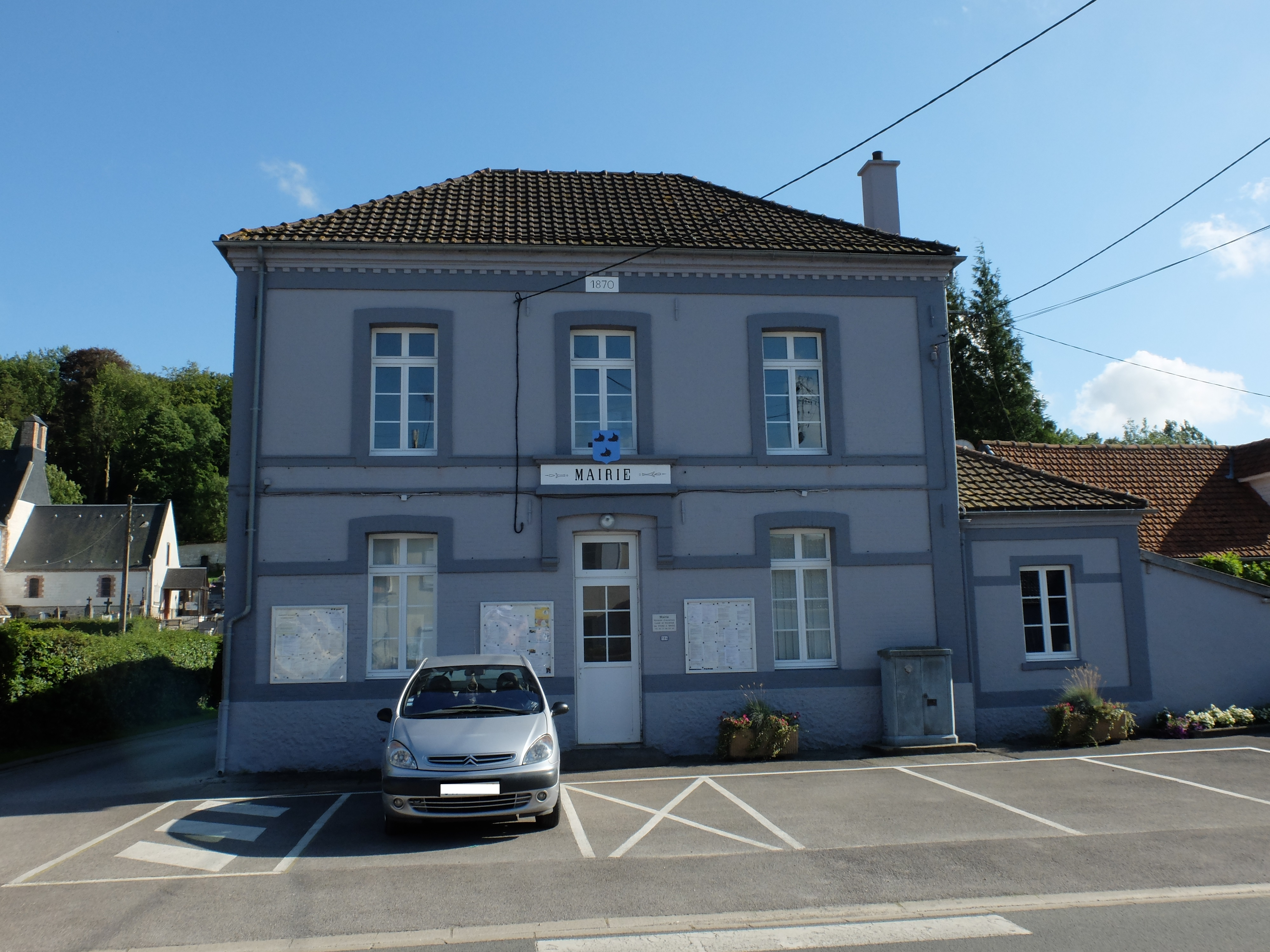 Vue de la mairie de La Calotterie.